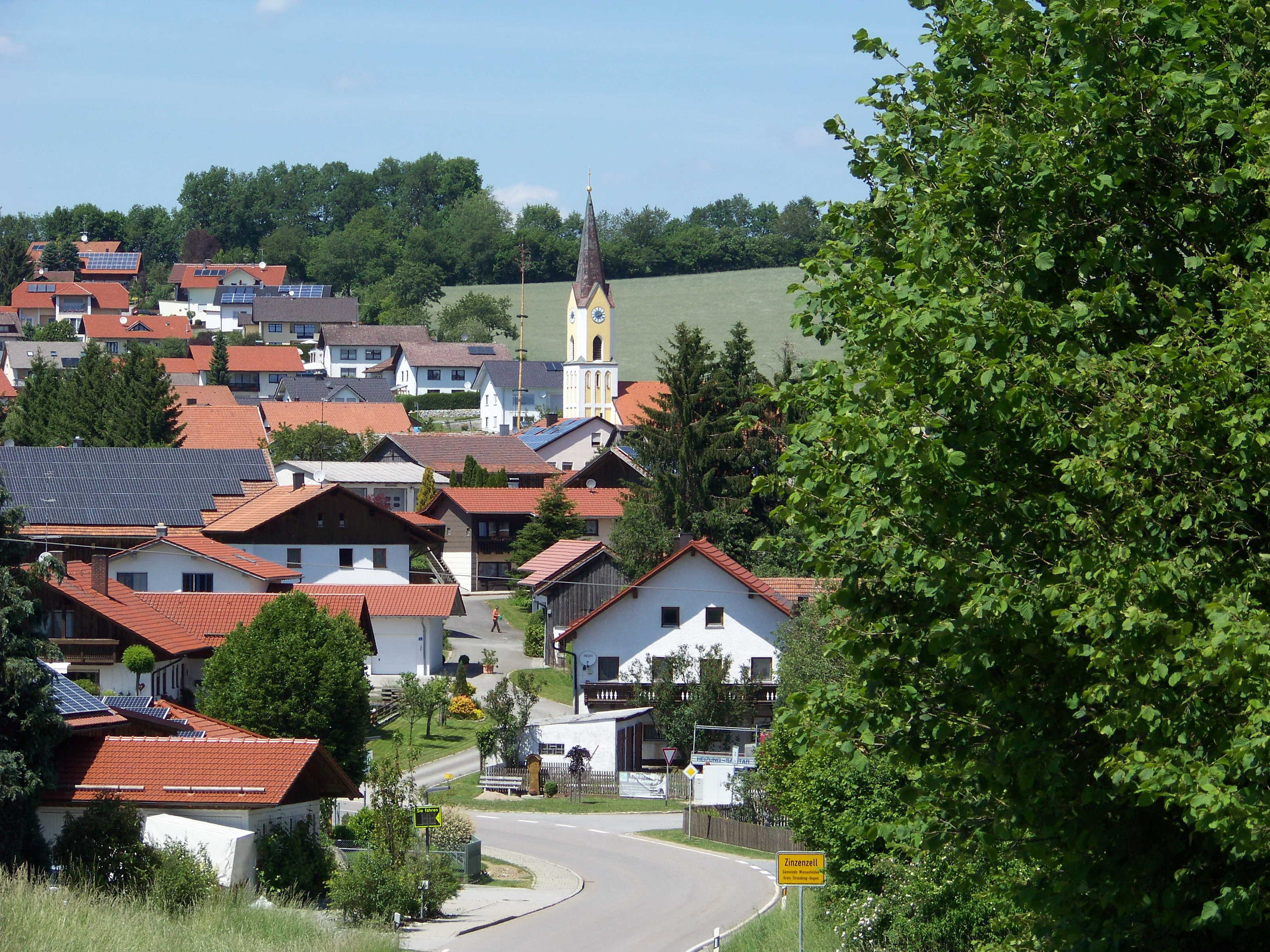 Zinzenzell, Dorfstraße 22. Katholische Filialkirche St. Michael. Gotisierender Neubau von 1876. Ortsansicht von Süden aus Richtung Hötzelsdorf.